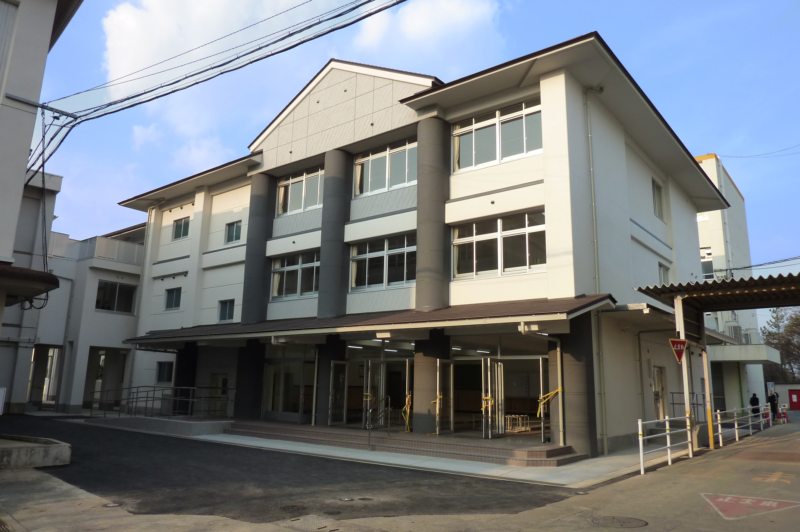 三重県立伊勢高等学校新1棟の写真